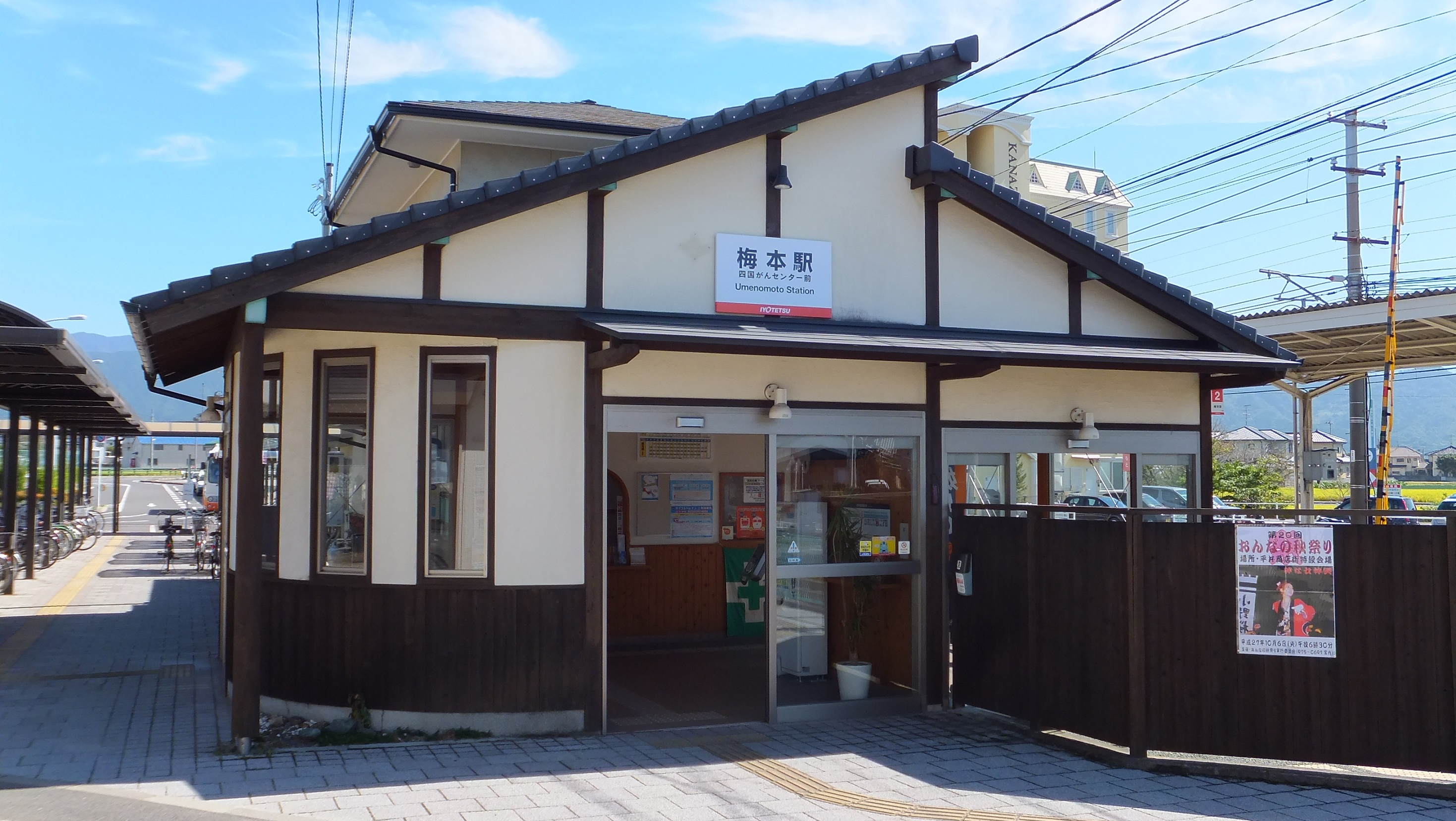 伊予鉄道 横河原線 梅本駅 （愛媛県松山市）2015年10月